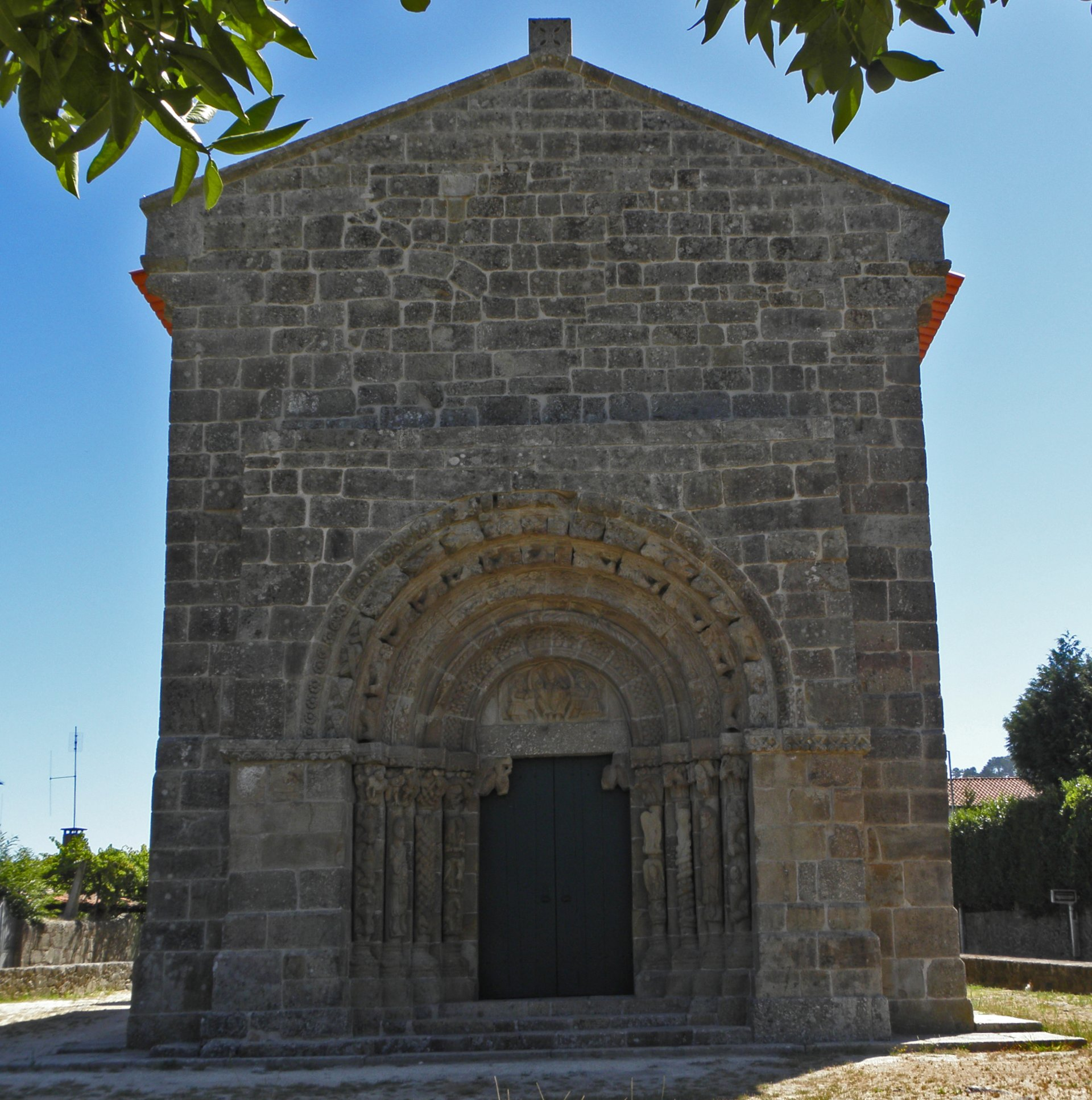 Igreja de Bravães, Ponte da Barca